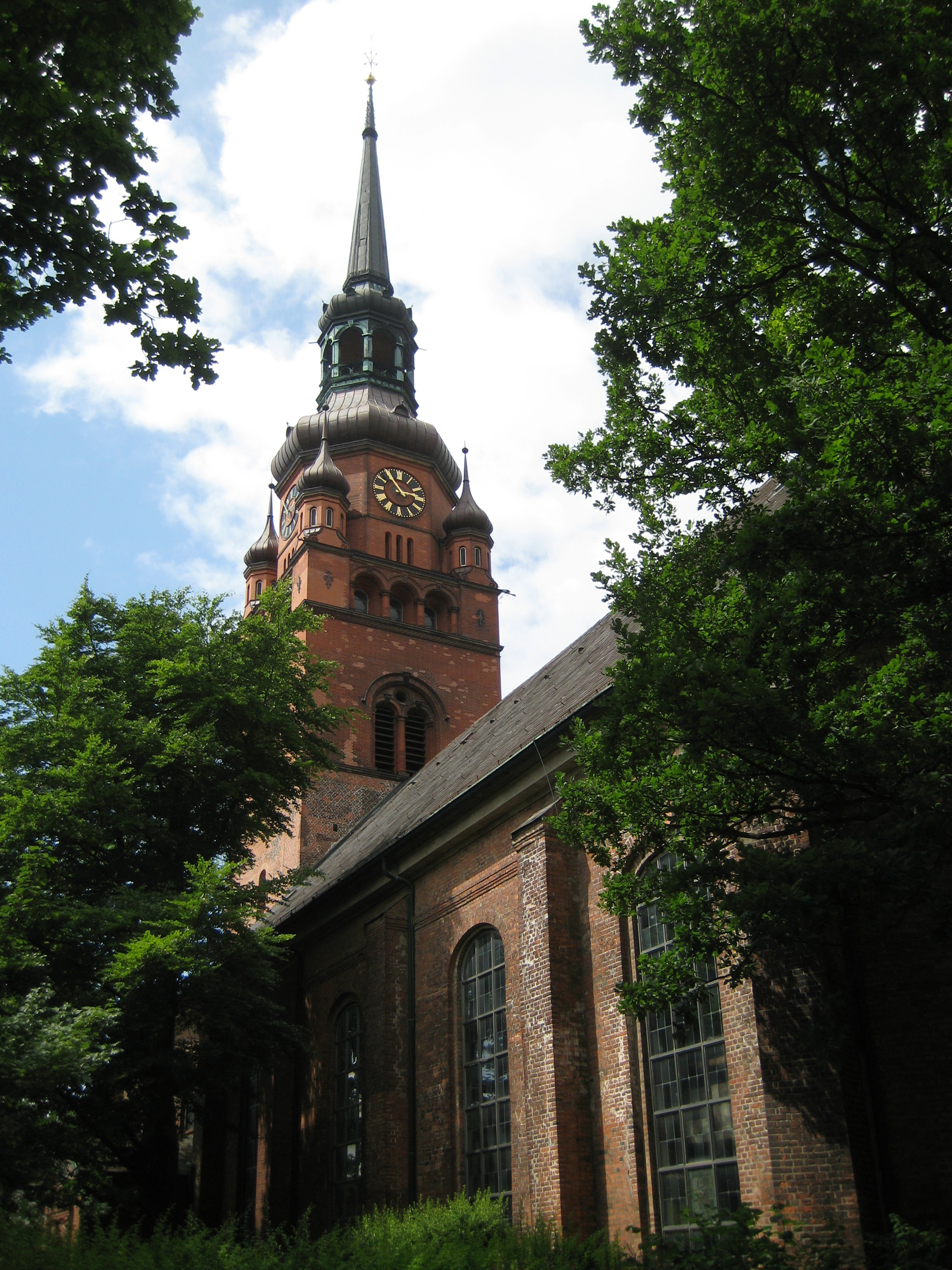 Itzehoe, Germany - Laurentii-Kirche